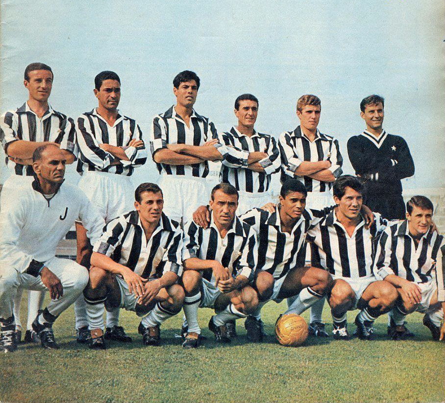 Una formazione della Juventus F.C. nella stagione 1963-64. Da sinistra, in piedi: E. Castano, D. da Costa, S. Salvadore, A. Gori, B. Sarti, R. Anzolin; accosciati: P. Amaral (allenatore), C. Dell'Omodarme, L. del Sol, Claudio Olinto de Carvalho "Nené", O. Sívori (capitano), G. Menichelli.